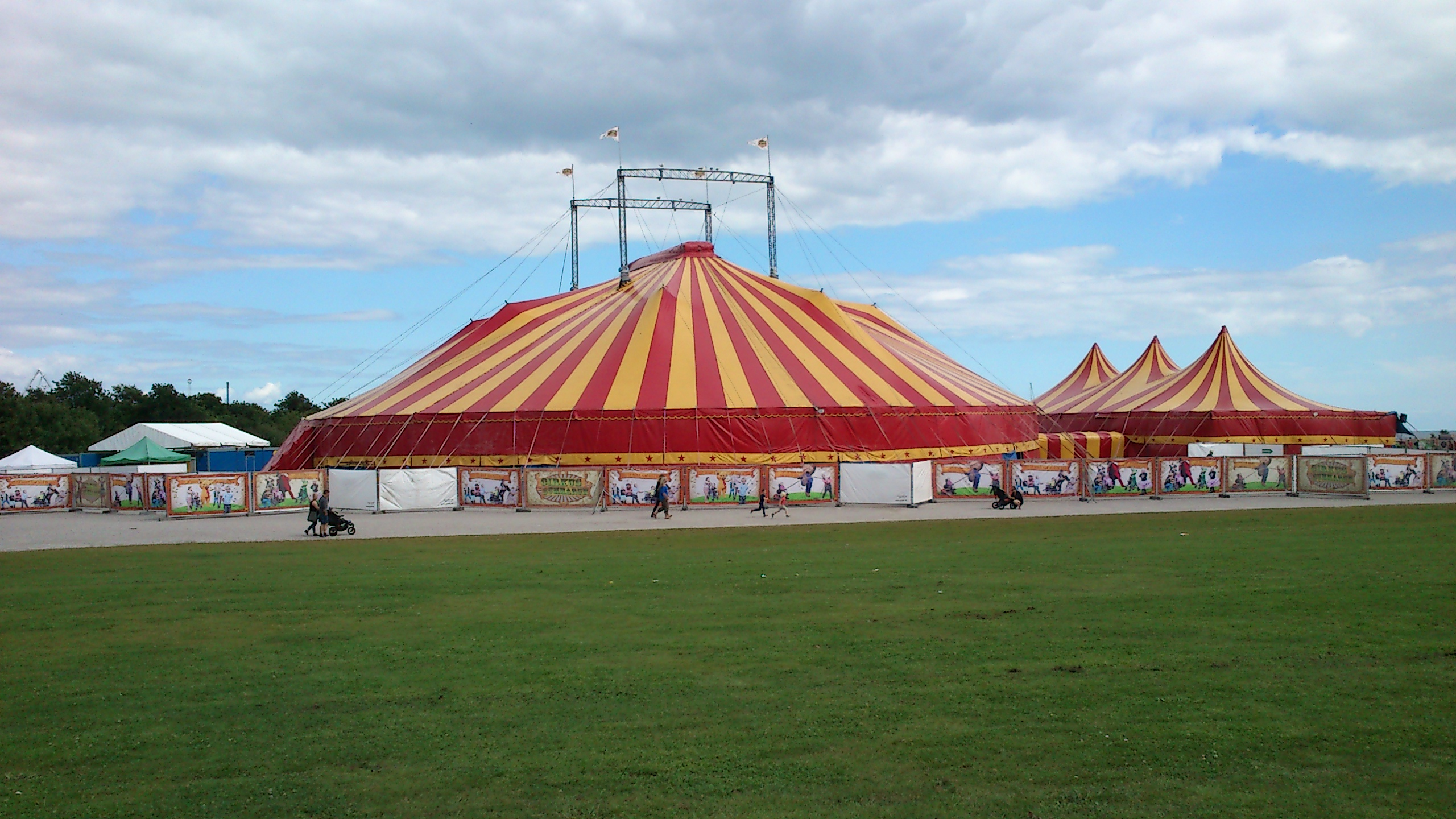 Cirkus Summarum på Tangkrogen sidst i juli 2016.